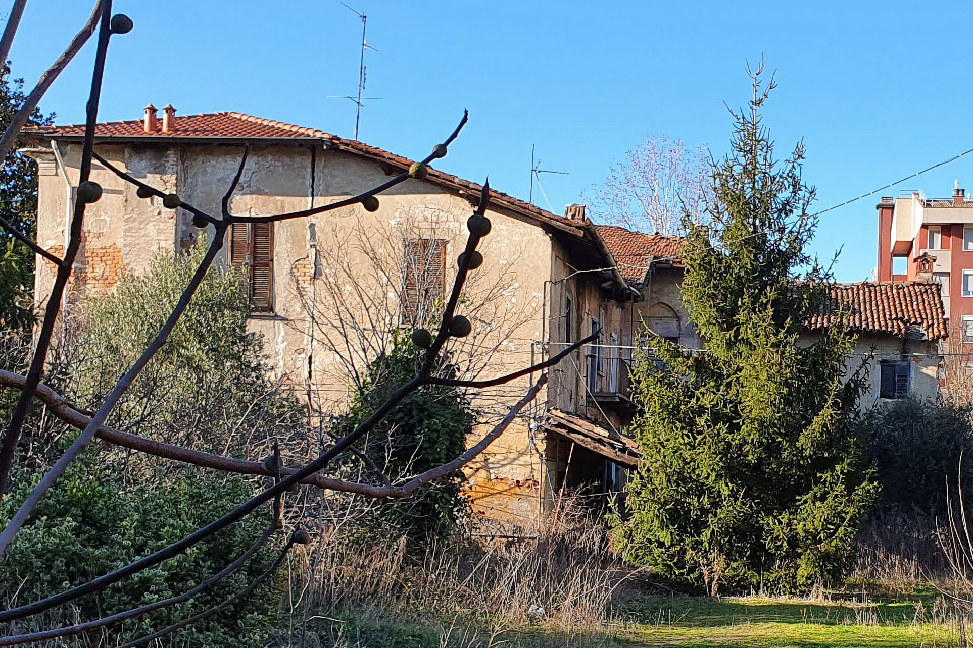 Foto della facciata sud della Cascina Cort del Colombin a Milano